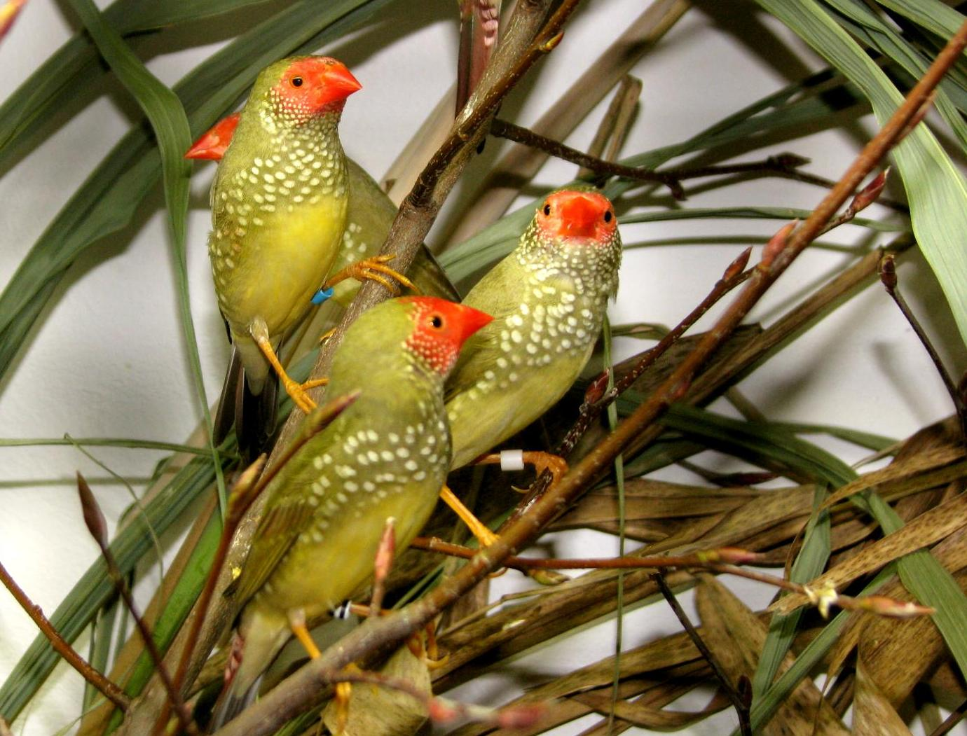 Binsenastrild (Neochmia ruficauda) Fotografiert: Köln-Ornithea 2011